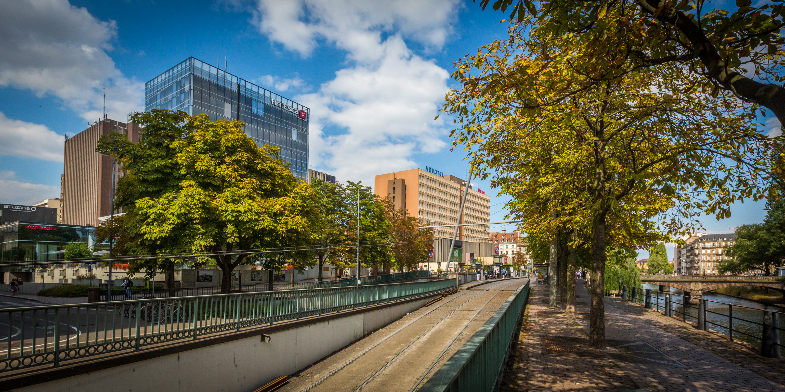 Strasbourg quai Kléber août 2015